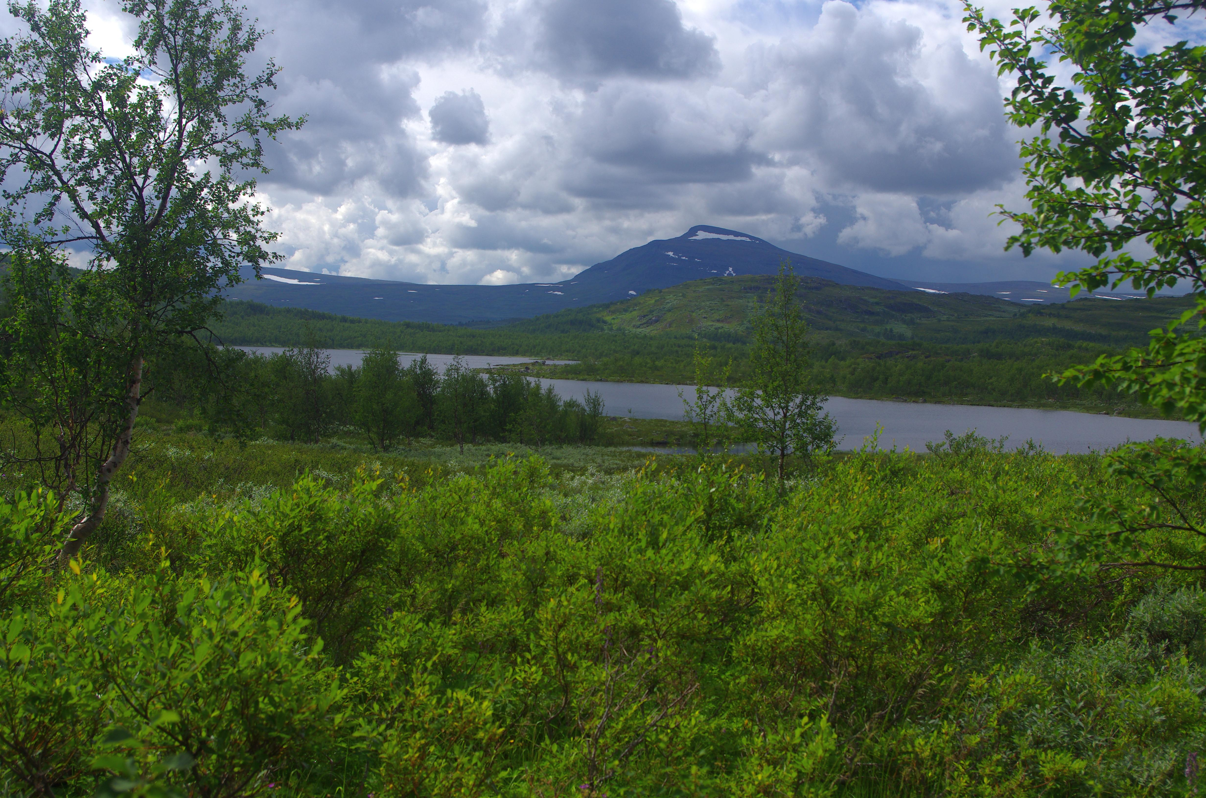 Blassok (Plassuoke) en sjö i Arjeplogs kommun i Lappland i Sverige.